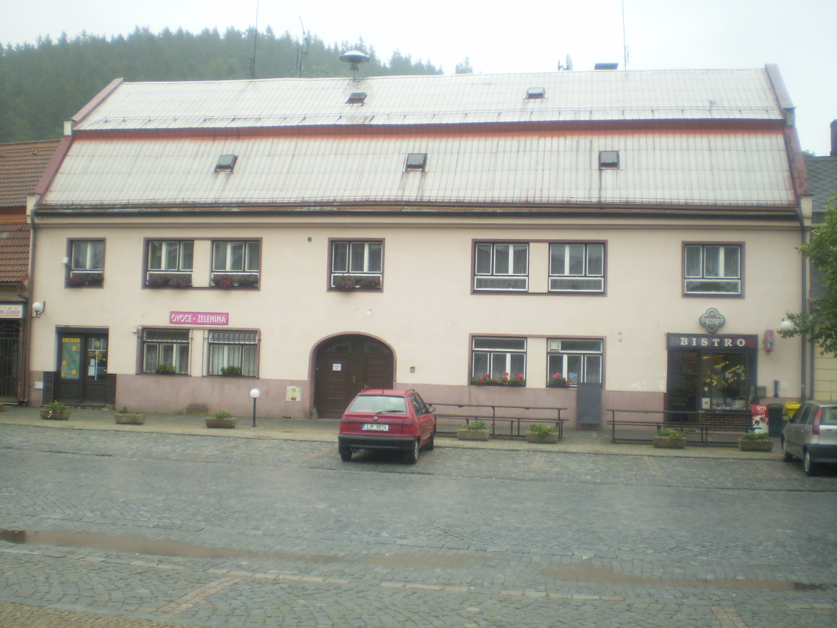 Budova náměstí Jana Karafiáta 18, Jimramov.